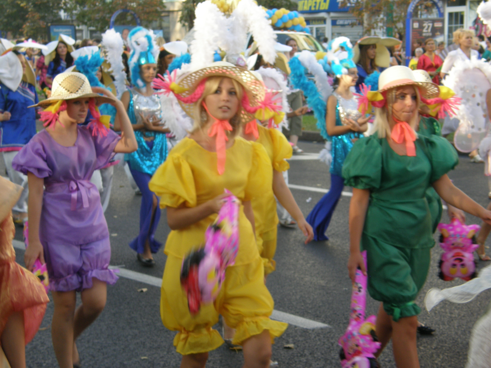 Донецк. Карнавал на день города.